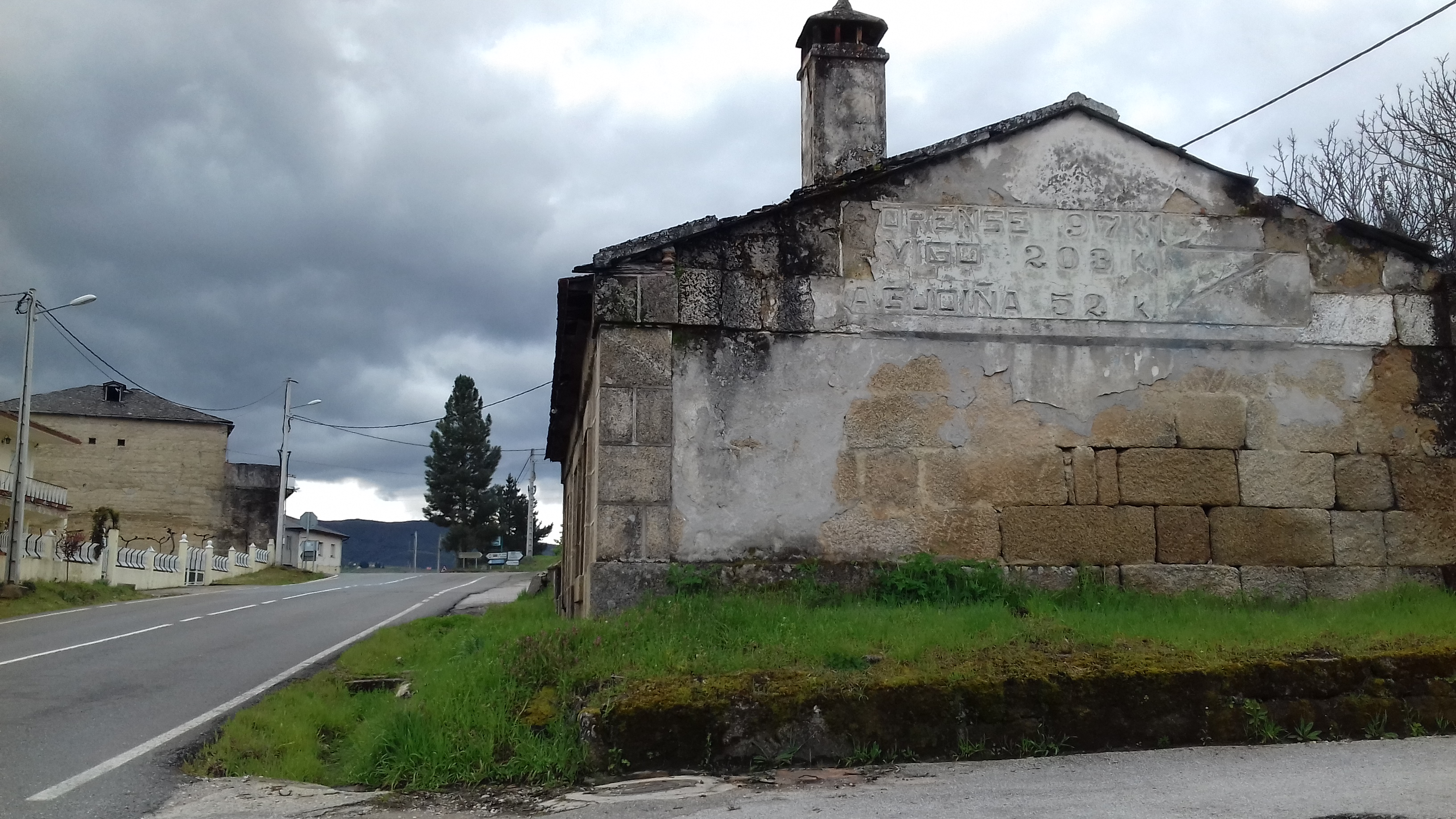 Caseta de peóns camiñeiros na aldea da Caseta, Freixido, Larouco, a carón da estrada OU-533